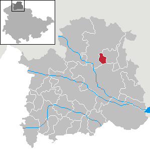 Gemeinde Harzungen in Thüringen, Landkreis Nordhausen